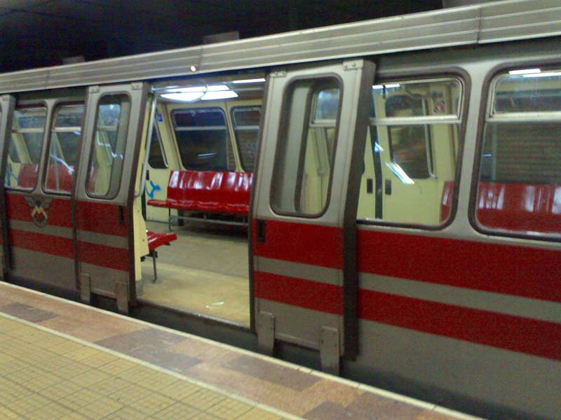 Metrou vechi. Imaginea este realizată cu un mobil.